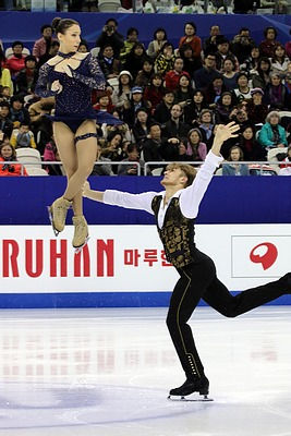 Кристина Астахова и Алексей Рогонов на чемпионате мира 2015